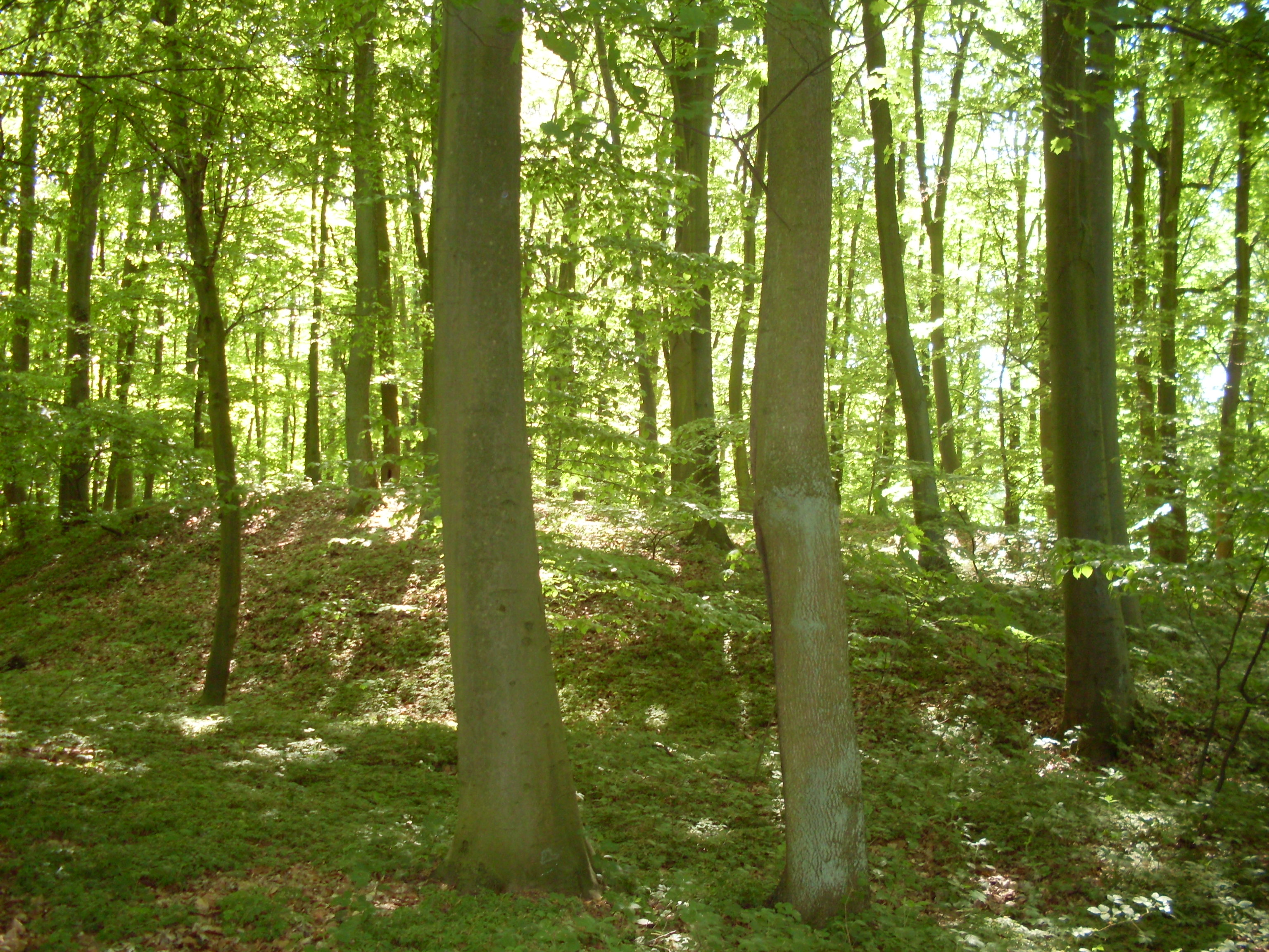 Wzgórza Warszewskie w Policach